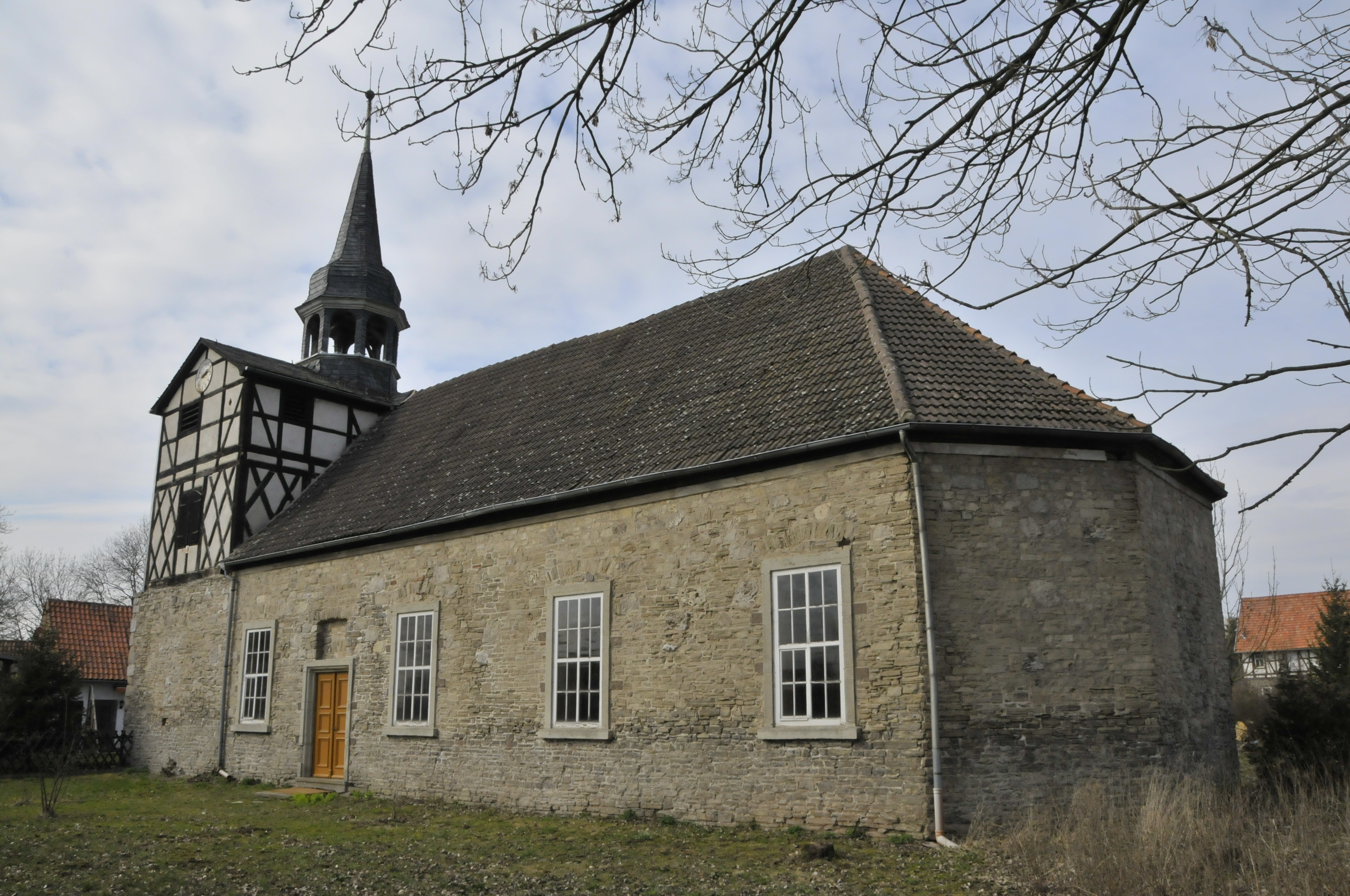 Haferungen, Kirche